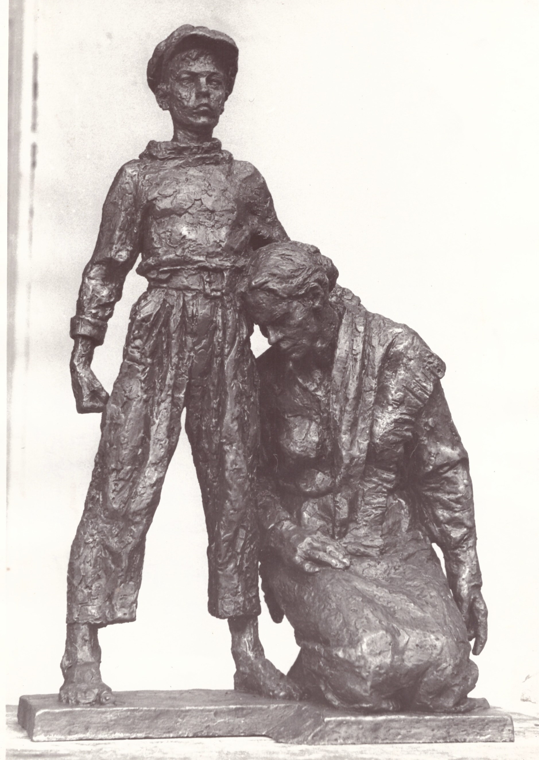 Пам’ятник «Нескорені» для спаленого німецько-фашистськими загарбниками в 1943 році с. Майдан-Копищенський Олевського району Житомирської області. 1977. Скульптор Таранченко В.О., архітектор Марчук М.Г. Литий бетон.